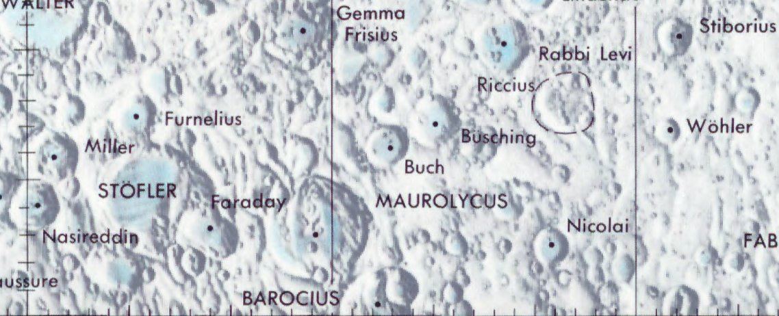 Cráter lunar Buch. Localización. (Lunar Chart LPC1. Second Edition)